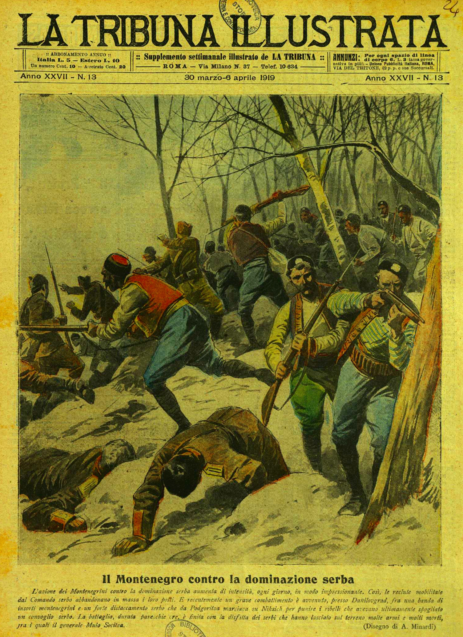 Srpskohrvatski / српскохрватски: Naslovnica talijanskog nedjeljnika “La tribuna illustrata” u br. od 30. ožujka – 6. travnja 1919. godine pod naslovom "Crna Gora protiv srpske dominacije" (Il Montenegro contro la dominazione serba)